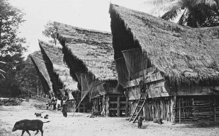 Foto. Batak huizen in een dorp op Sumatra.